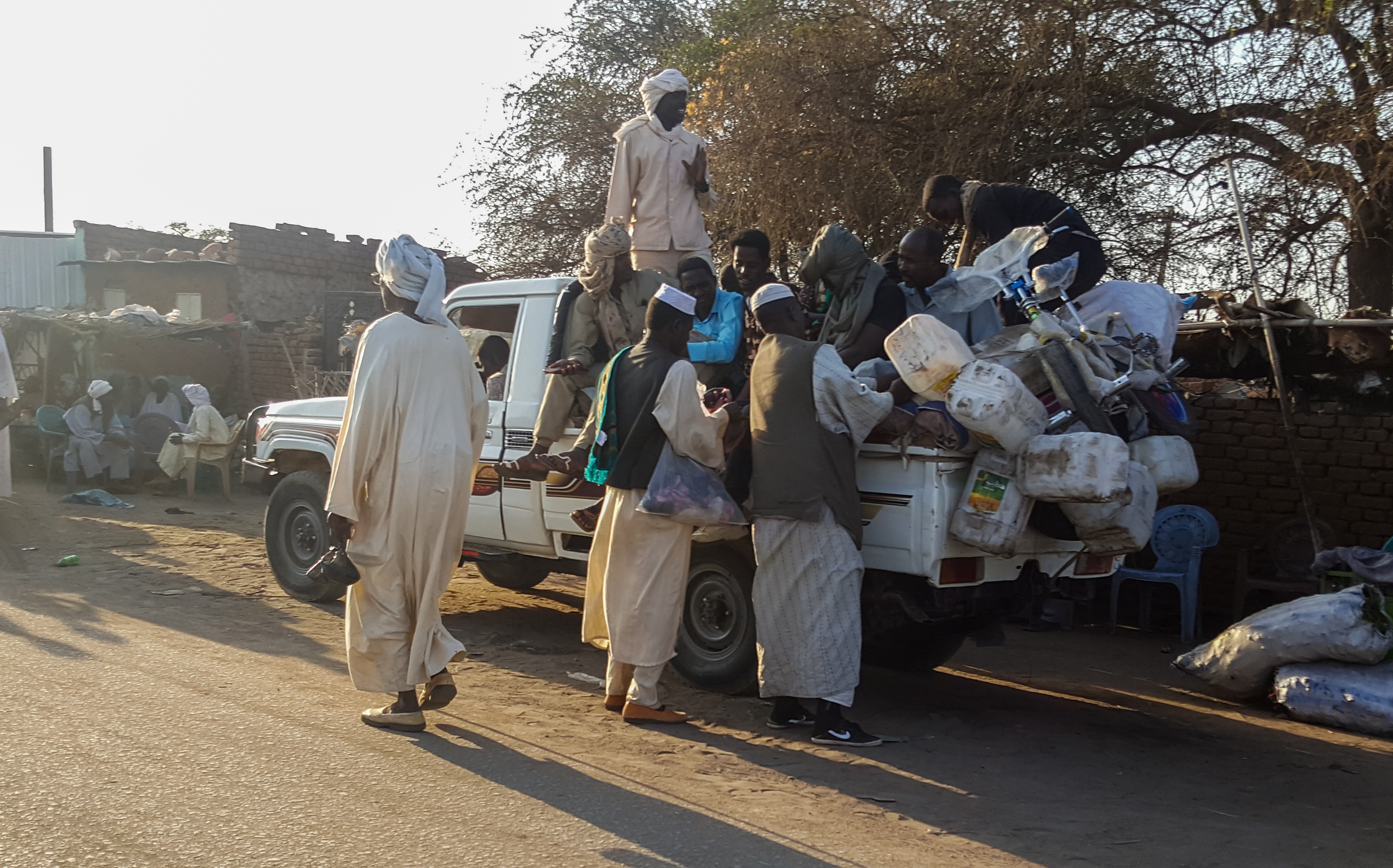 WLASudan2020 This is an image with the theme "Africa on the Move or Transport" from: Sudan